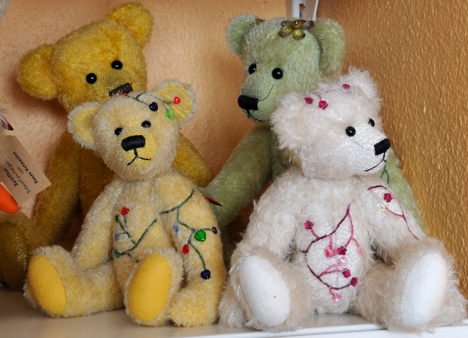 Teddybiere vum Renée Hutmacher